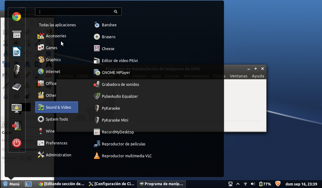 Captura de pantalla de la versión beta de Tuquito, un sistema operativo basado en debian y ubuntu.